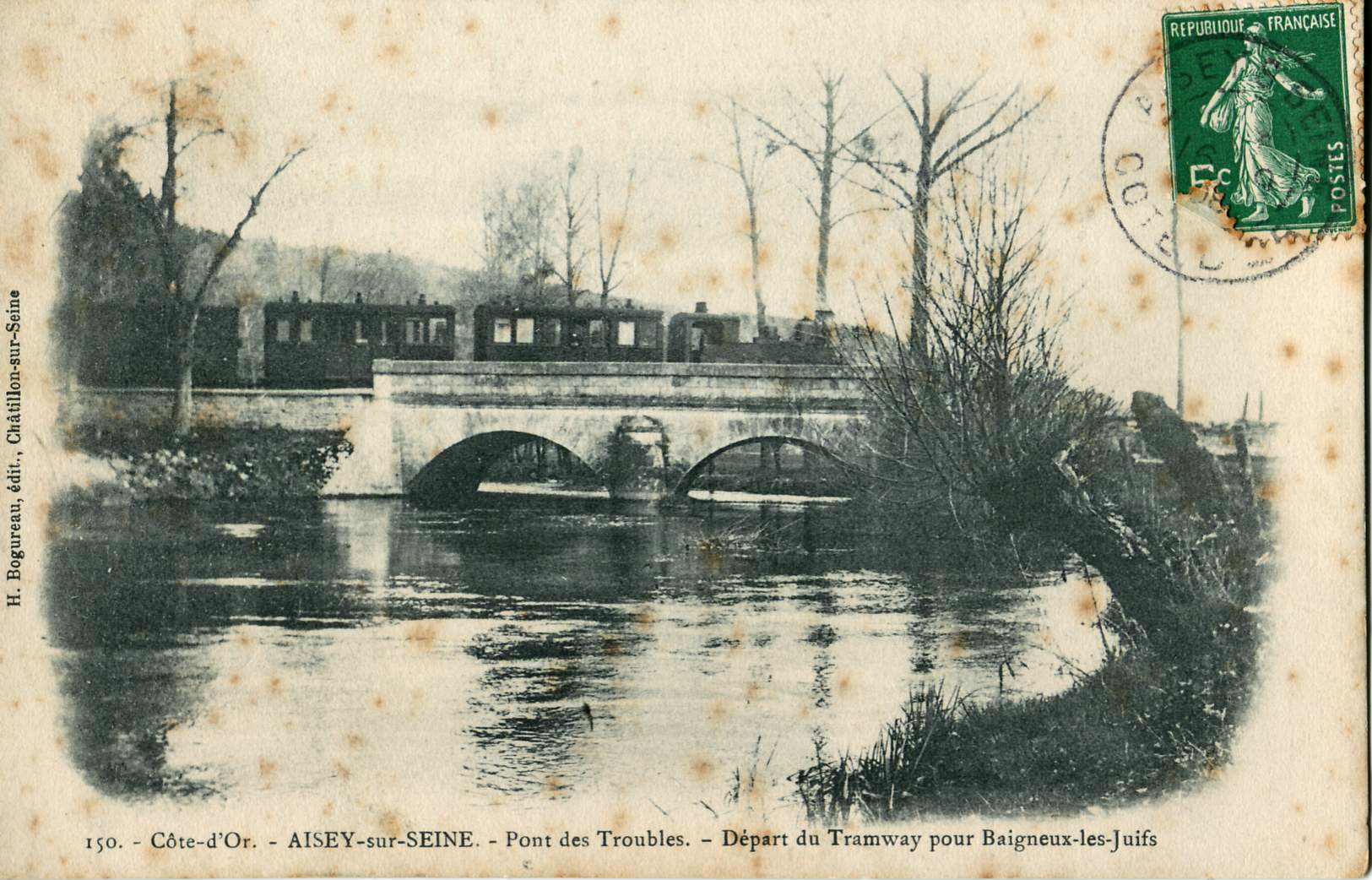 Carte postale ancienne éditée par H. Bogureau, éditeur à Châtillon-sur-Seine, n°150 :AISEY-SUR-SEINE - Pont des Troubles - Départ du Tramway pour Baigneux-les-Juifs (Chemins de fer départementaux de la Côte-d'Or